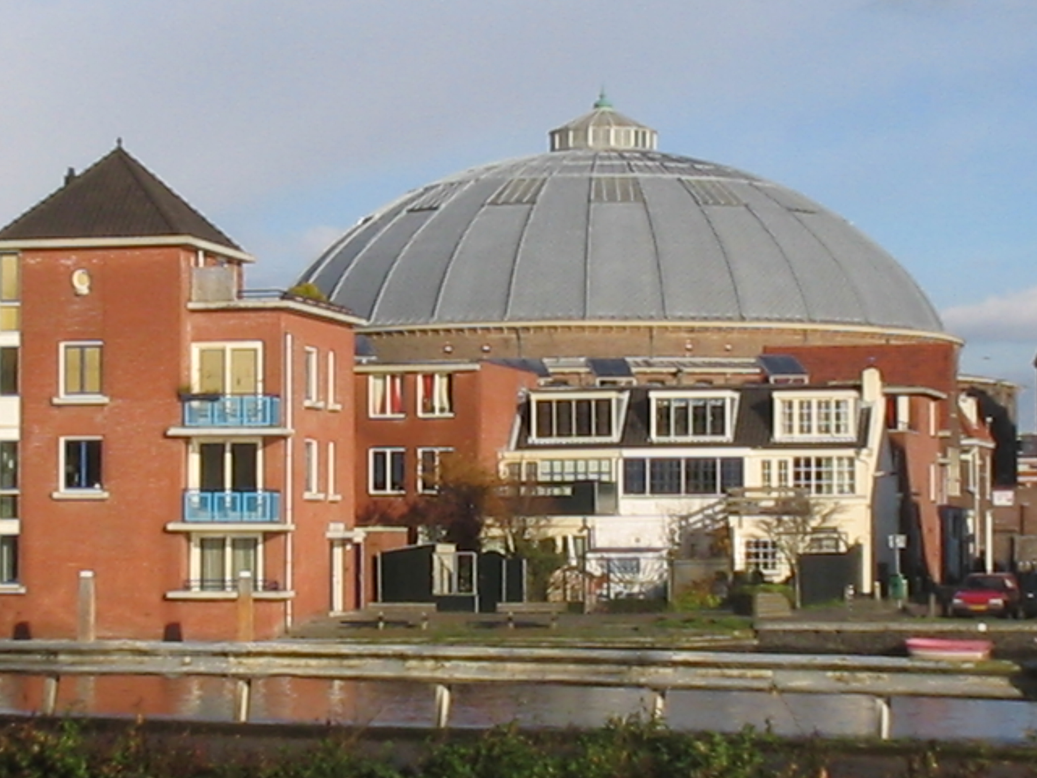 Haarlem, gevangenis gezien vanaf het Spaarne, november 2005